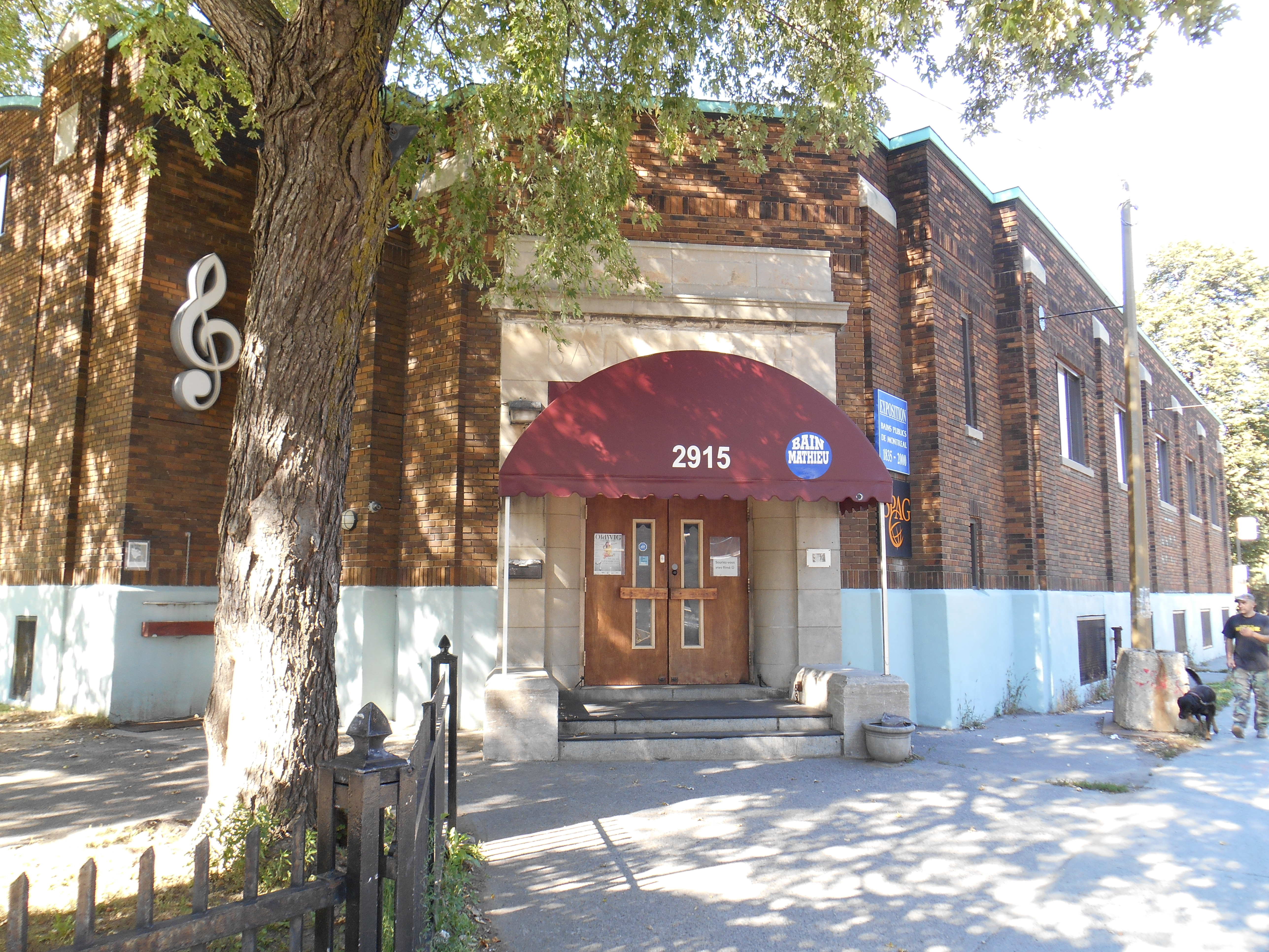 Le Bain Mathieu, construit en 1931, est un ancien bain public de Montréal, situé au 2915, rue Ontario Est.